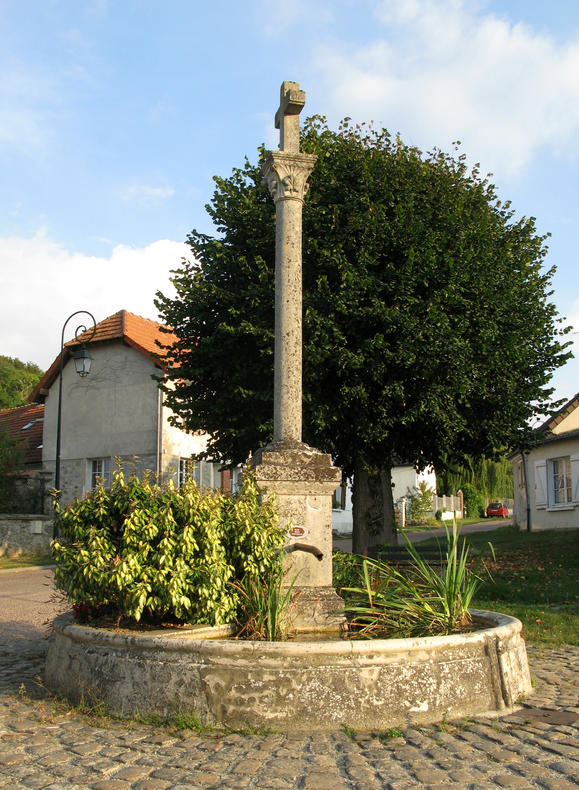 La Croix-sur-Ourcq (Aisne, France) - Ancienne fontaine. . .